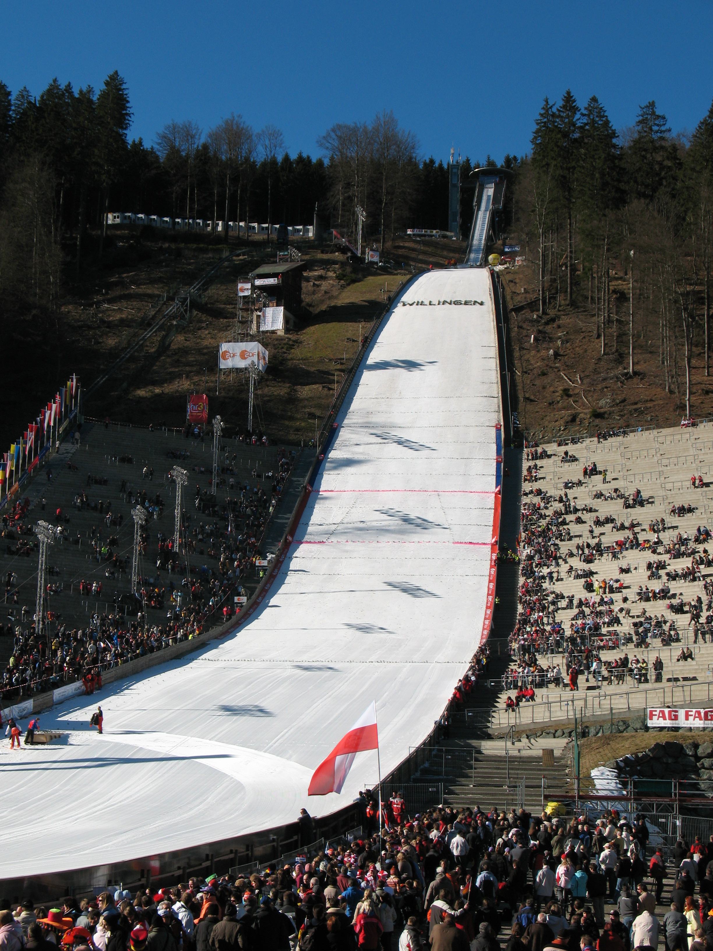 Mühlenkopfschanze, Willingen, Germany